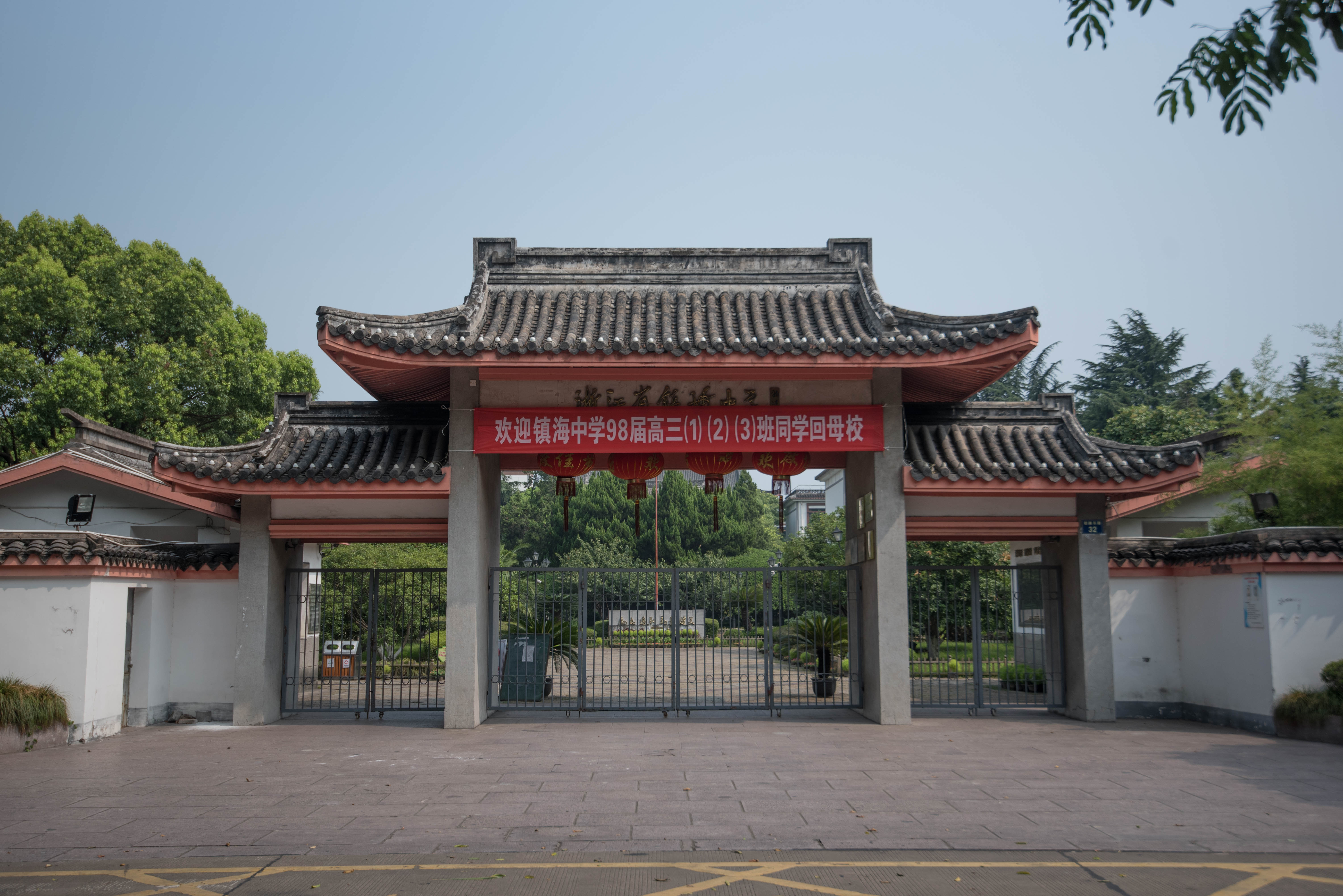 镇海中学大门